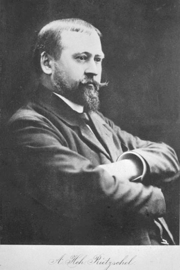 Alexander Heinrich Rietzel